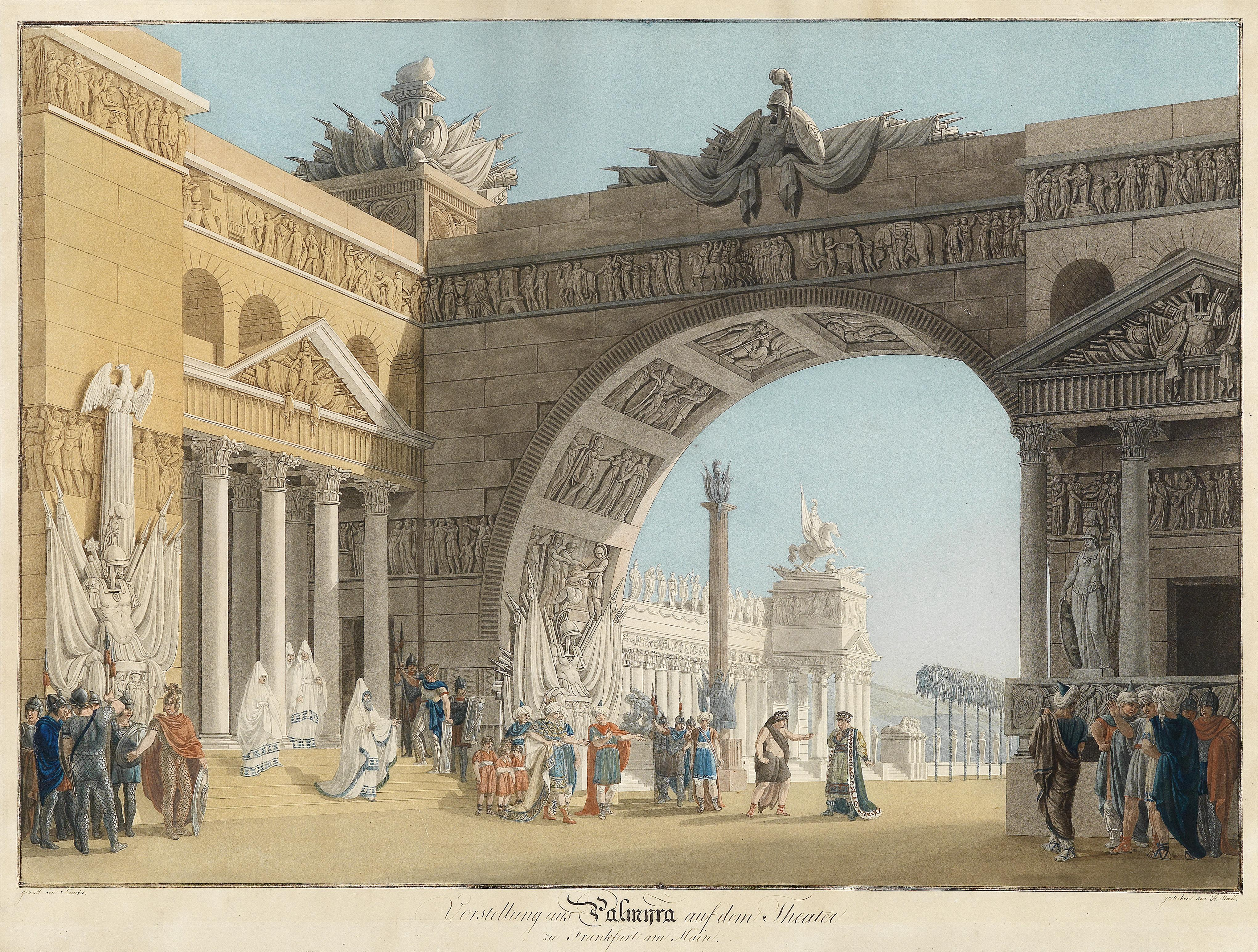 Bühnenbild zur Oper "Palmyra" (Antonio Salieri), Prinzessin von Persien: Großer Platz, kolorierte (aquarellierte) Aquatintaradierung nach einem Entwurf von Giorgio Fuentes (Mailand 1756-1821), 51,3 x 73,4 cm. Für das vierte Bild der Oper (Akt 1, Szenen 10-11) schreibt der Librettist vor: "Magnifico Terreno di figura ovale con grand’Arco di trionfo nel fondo, che lascia libera la veduta d’una vasta piazza all’intorno ripiena di Popolo. Nella sommità del Salone Galleria ricolma di spettatori, dalla quale pendono dei coloriti tappeti. La volta del Salone è dipinta d’azzurro seminato di stelle d’oro rappresentanti le costellazioni e i pianeti. Alla destra trono." Siehe Libretto zur Uraufführung.